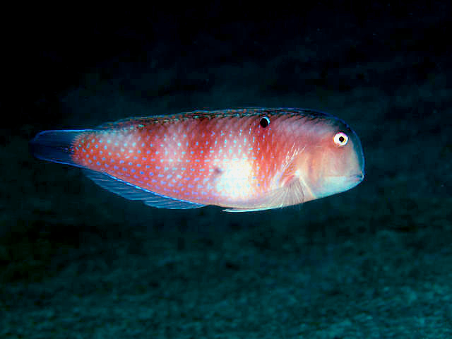 テンス Iniistius dea